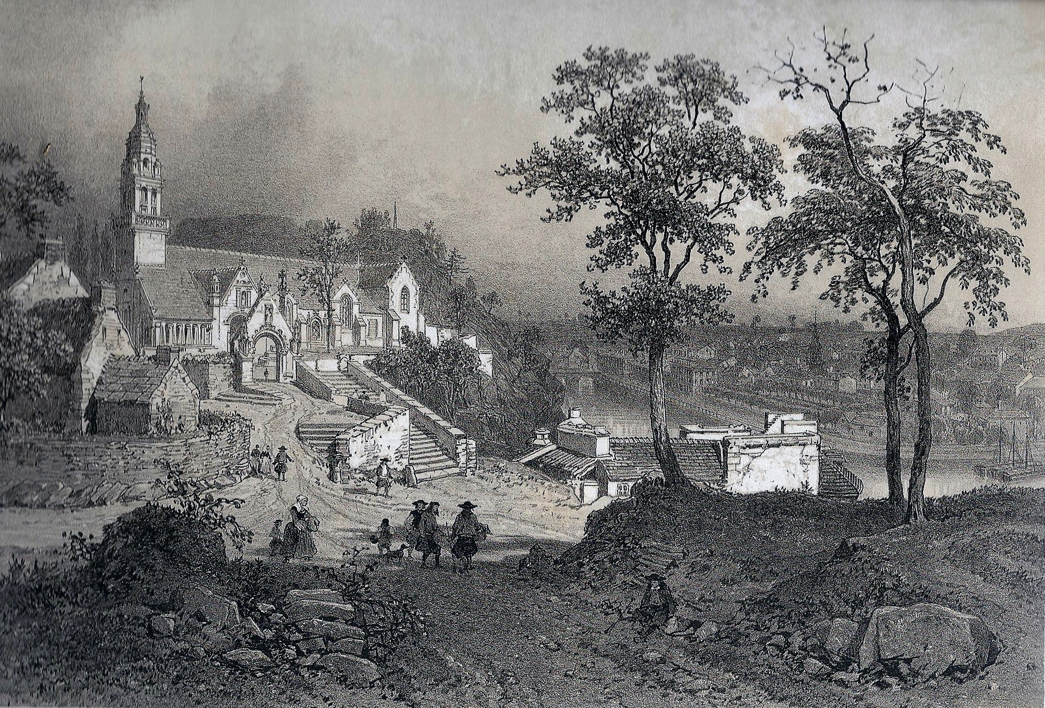 "Châteaulin, vue prise de la chapelle de l'ancien cimetière" (dessin d'Eugène Cicéri, publié dans Félix Benoist, "La Bretagne contemporaine", tome "Finistère", 1867)